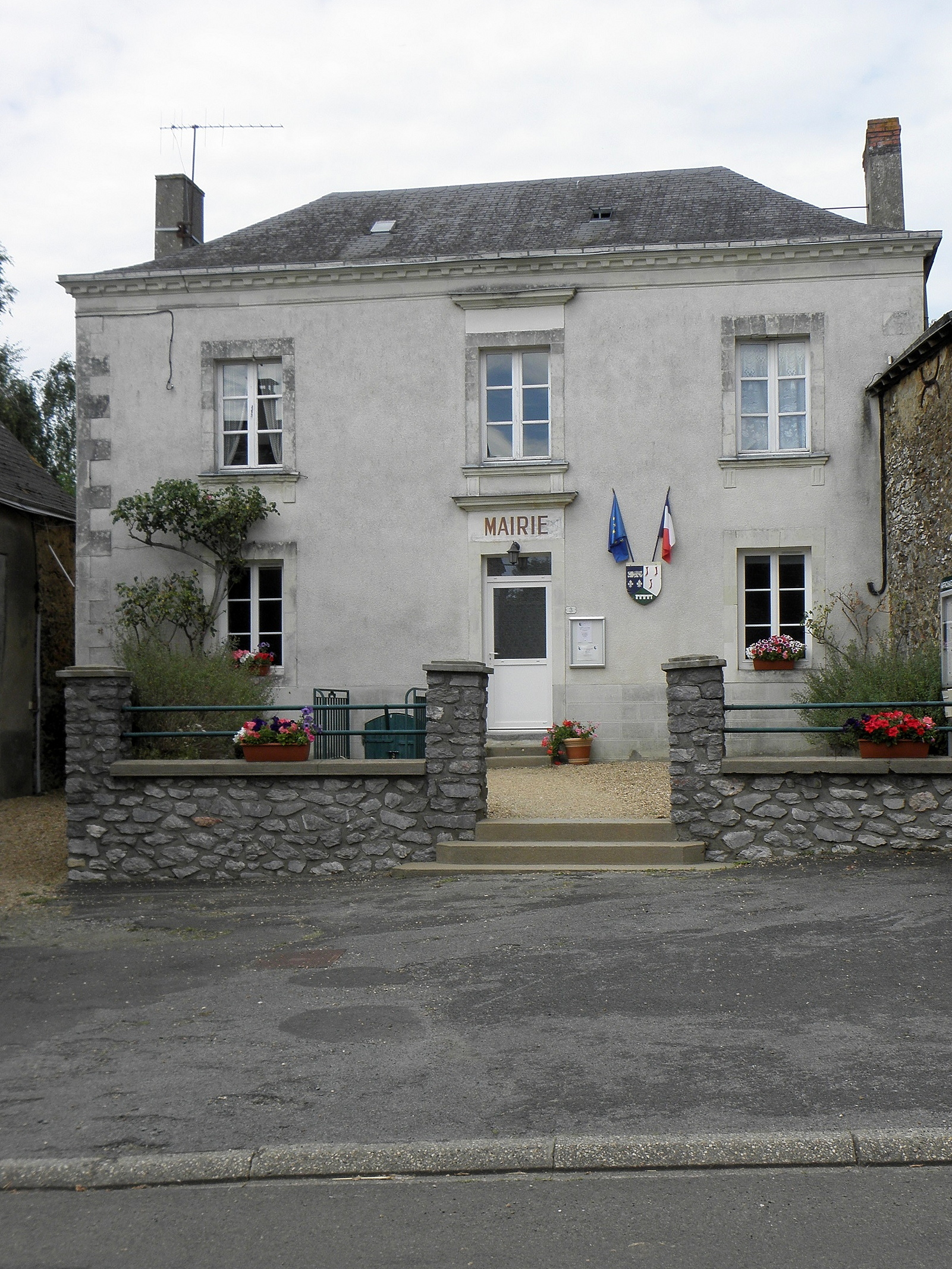 Mairie de Beaumont-Pied-de-Bœuf (53).